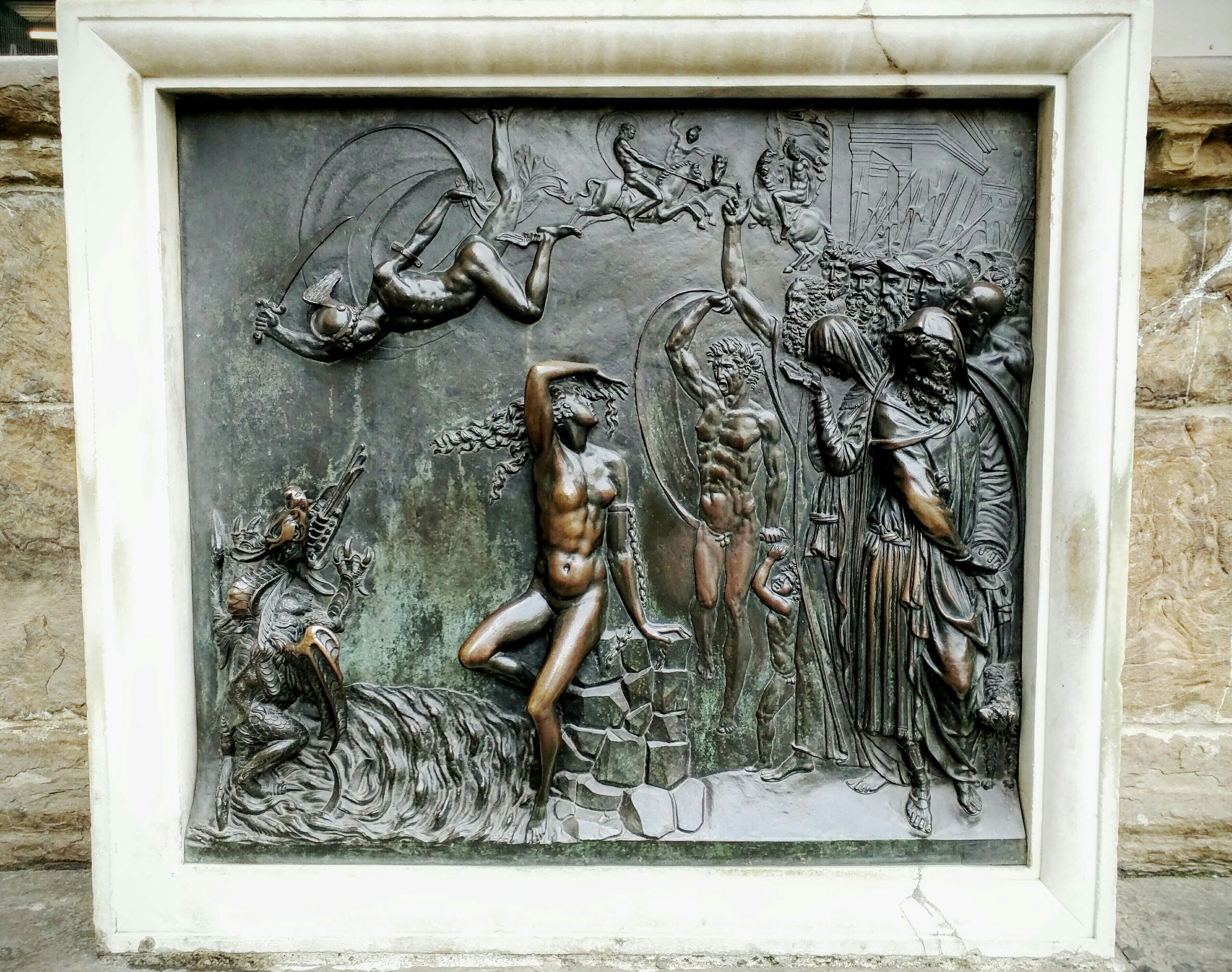 bronzetto Perseo cellini